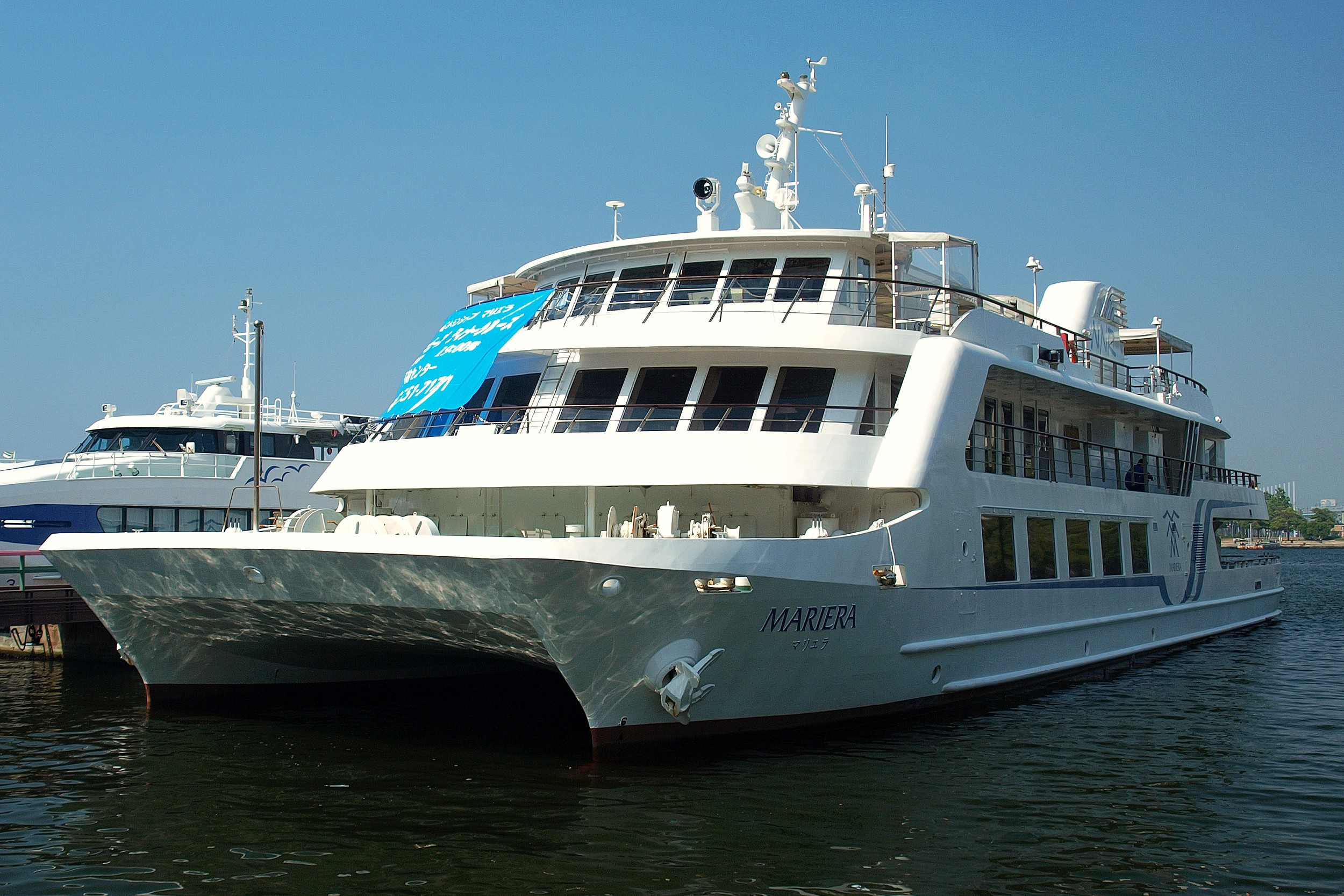 西日本鉄道のクルーズ船「マリエラ」。博多港にて。